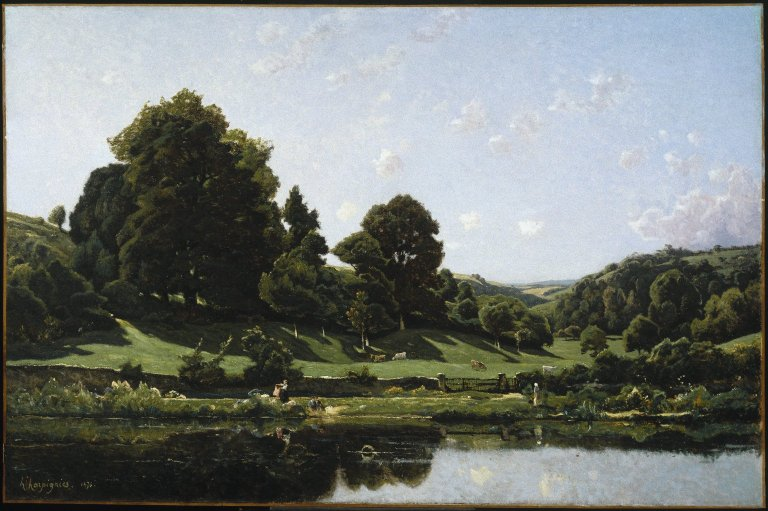 Depicted place: Bourbonnais